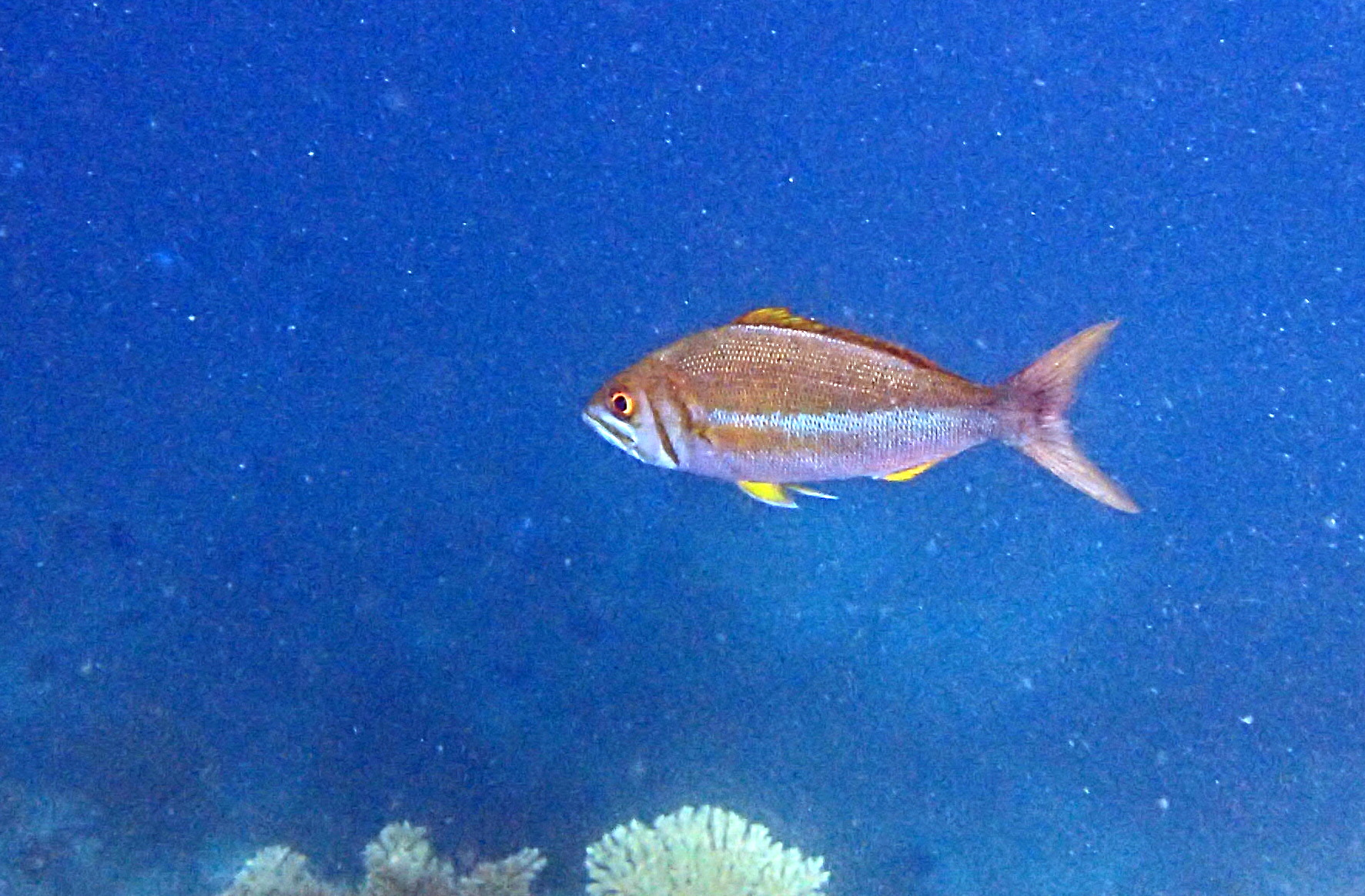 Aphareus furca aux Maldives (atoll de Baa).